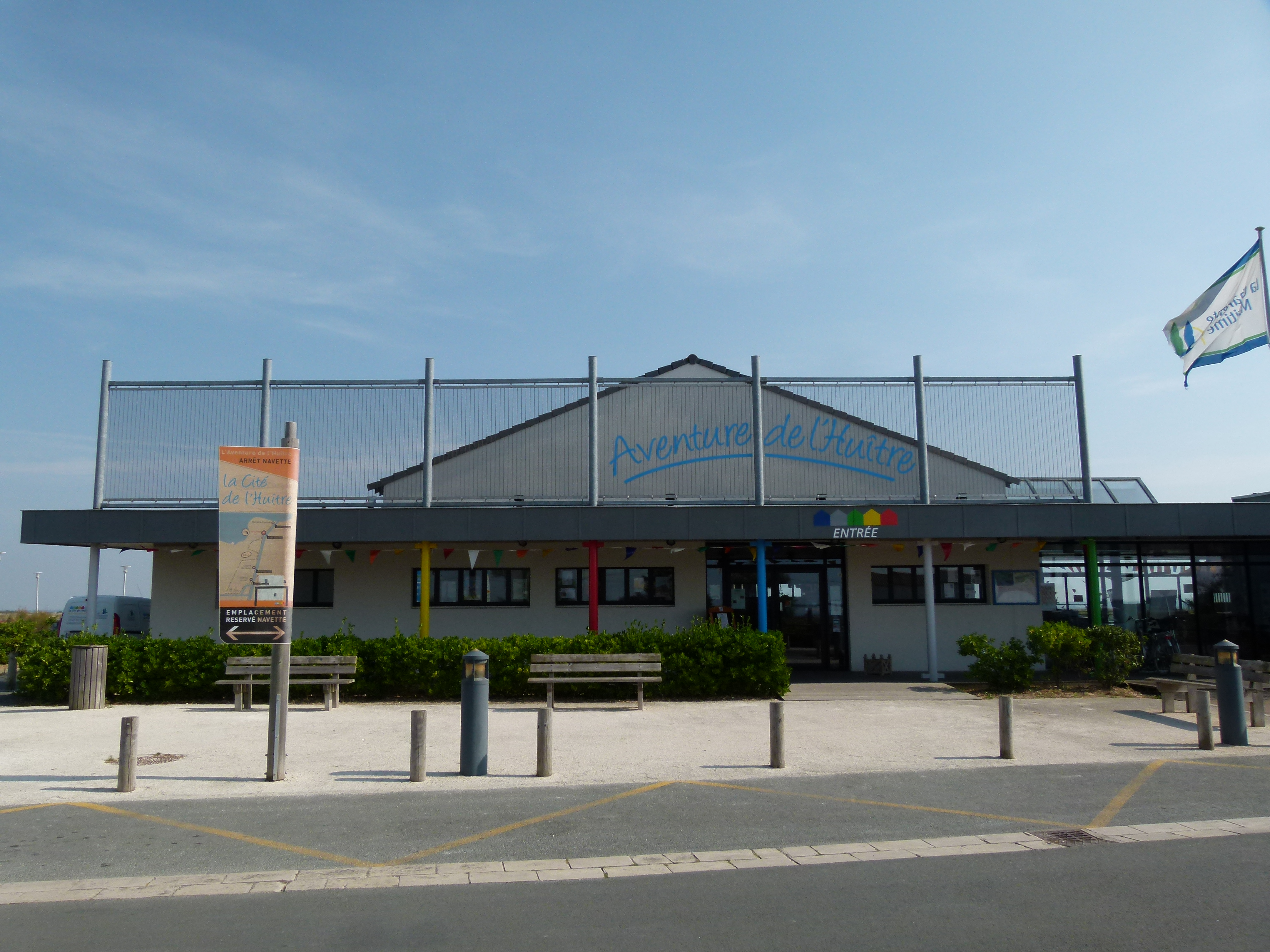 Bâtiment principal de la Cité de l'Huître à Marennes (Charente-Maritime); centre muséographique sur l’ostréiculture du bassin de Marennes-Oléron.